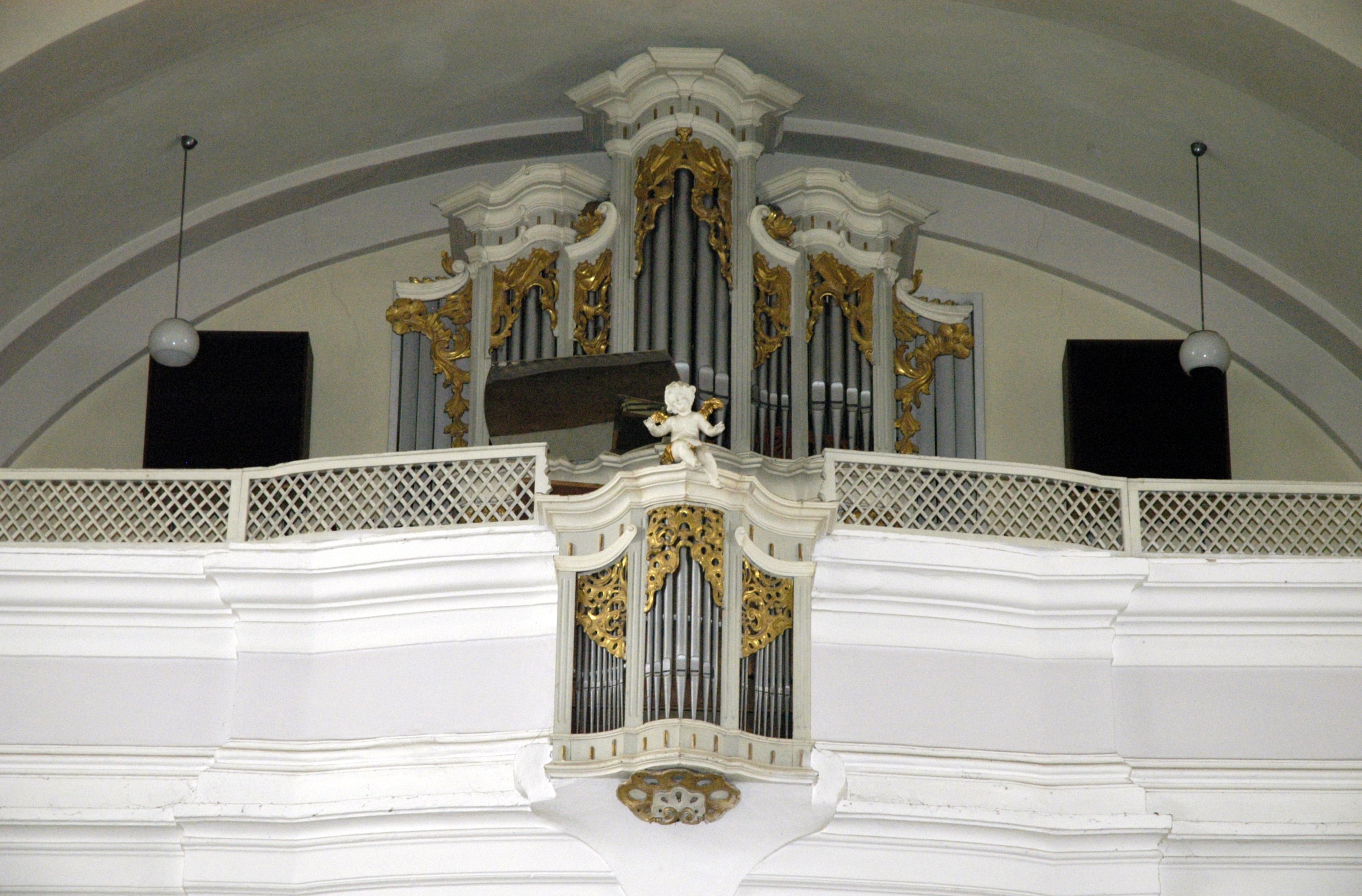 katholische Pfarrkirche heiliger Georg in Aspersdorf, Gemeinde Hollabrunn - Empore